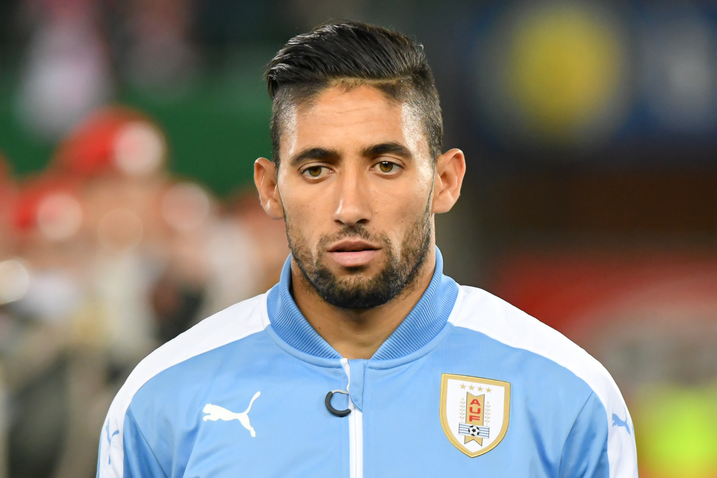 Wien, Österreich, 14.11.2017, Sport, Fussball, OEFB Freundschaftliches Laenderspiel - Österreich vs Uruguay. Bild zeigt Jonathan Urretaviscaya (URU).